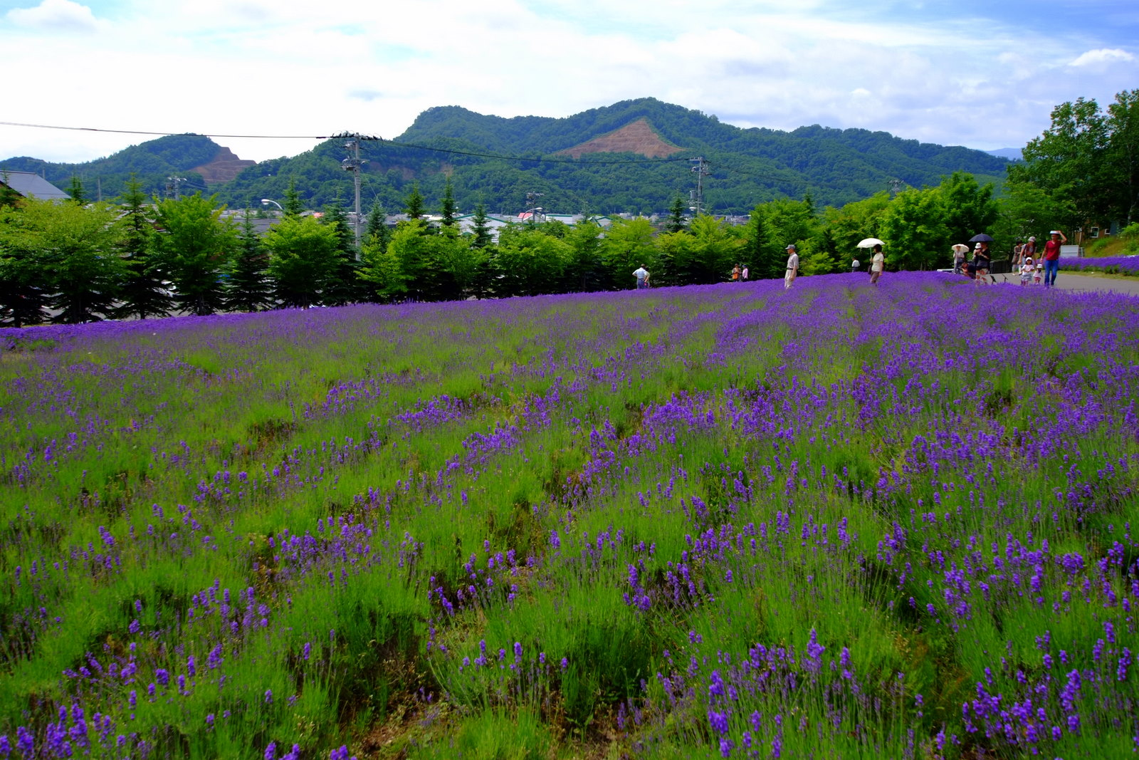 東海大学 ラベンダー畑（Lavender Fields, Tokai University）